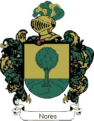 Es el escudo que representa dicho apellido. Su figura principal es un árbol